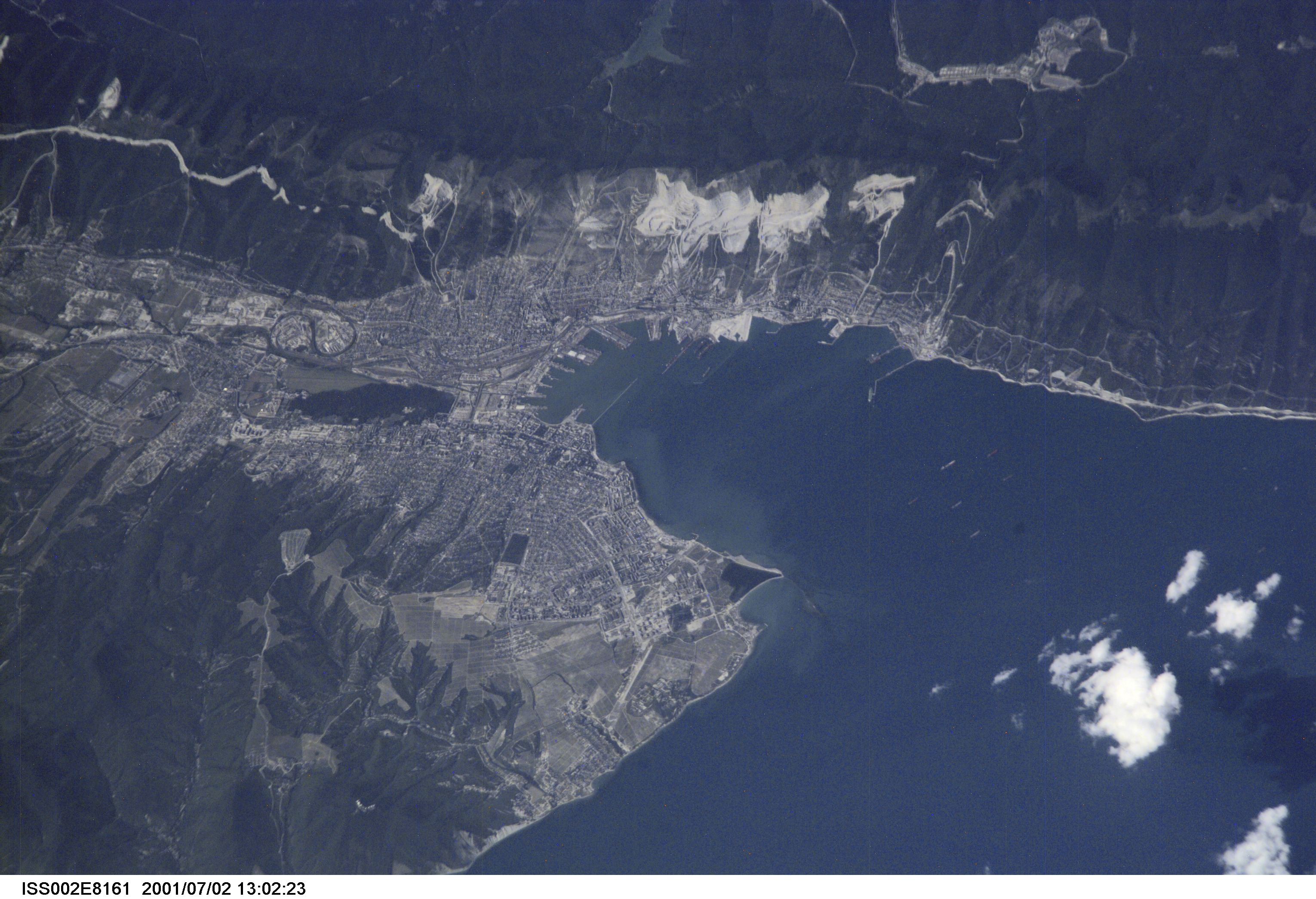 Вид Цемесской бухты из космоса